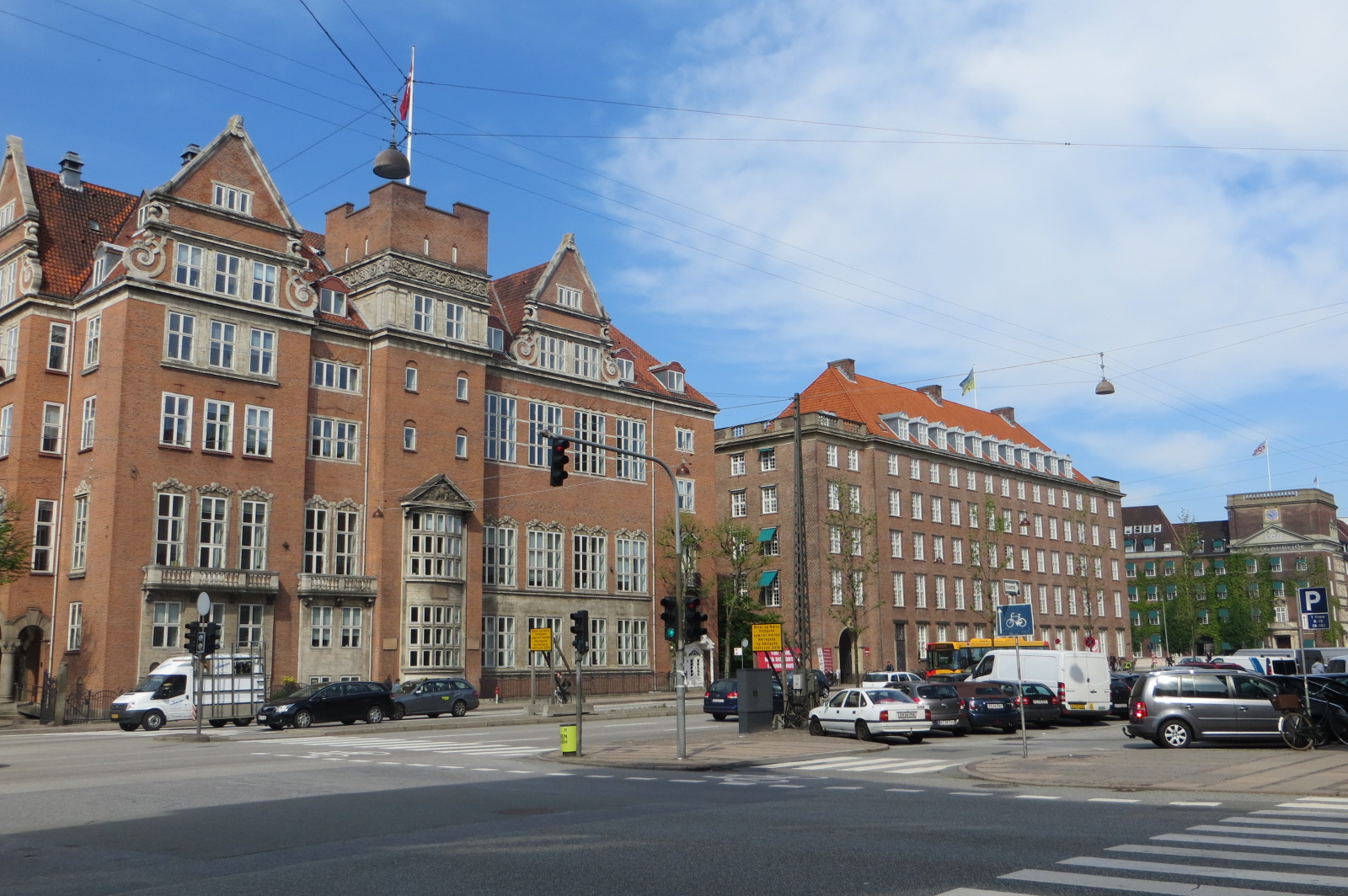 The Studenterforeningen Building (left) at H. C. Andersens Boulevard in Copenhagen, Denmark